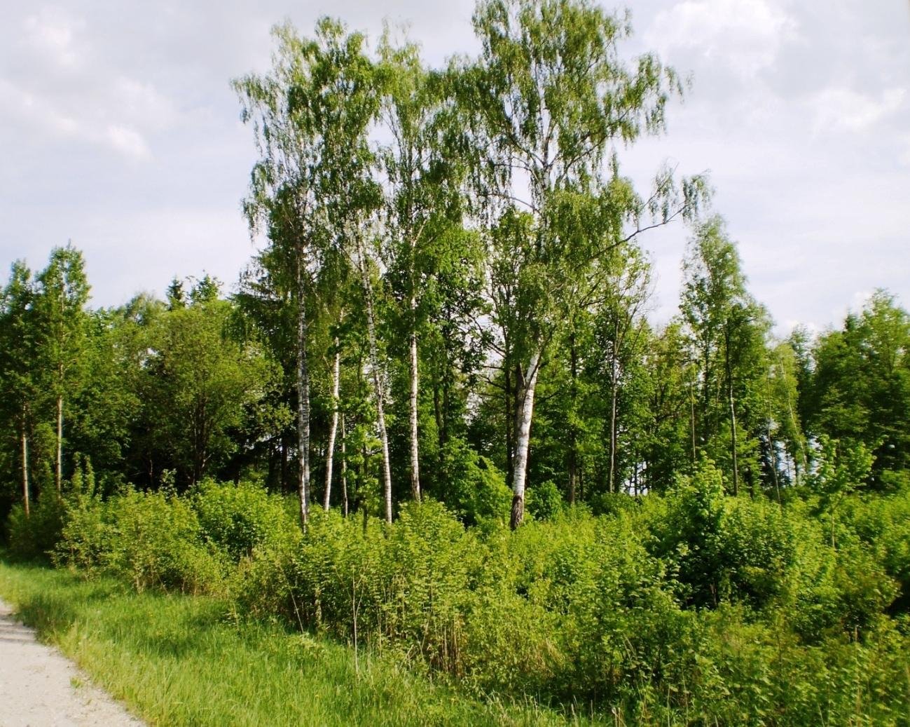 Kalnaberžės miškas, Kėdainių raj.